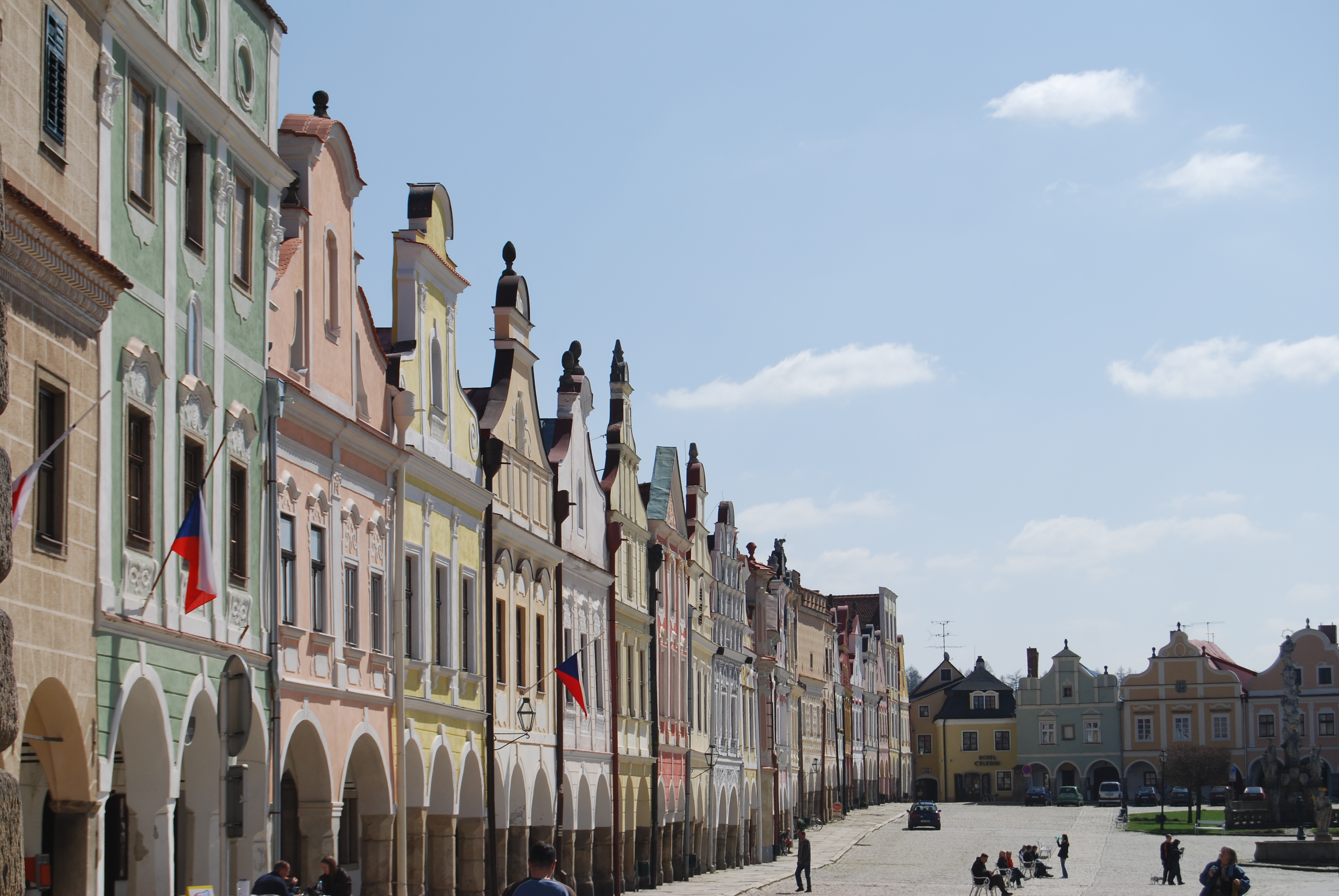 Náměstí v Telči.Telč.Okres Jihlava.Česko.